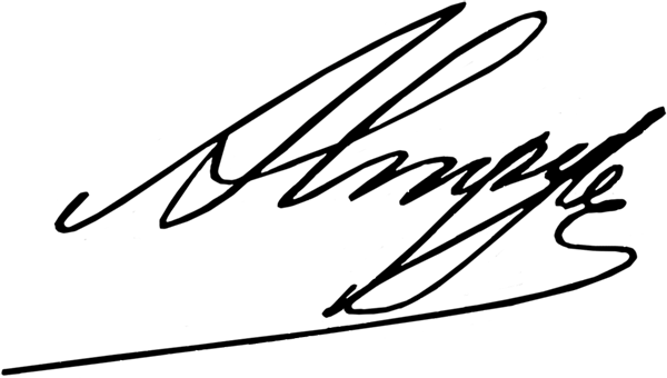 Роспись инженер-полковника Аманд Струве (1835–1898)